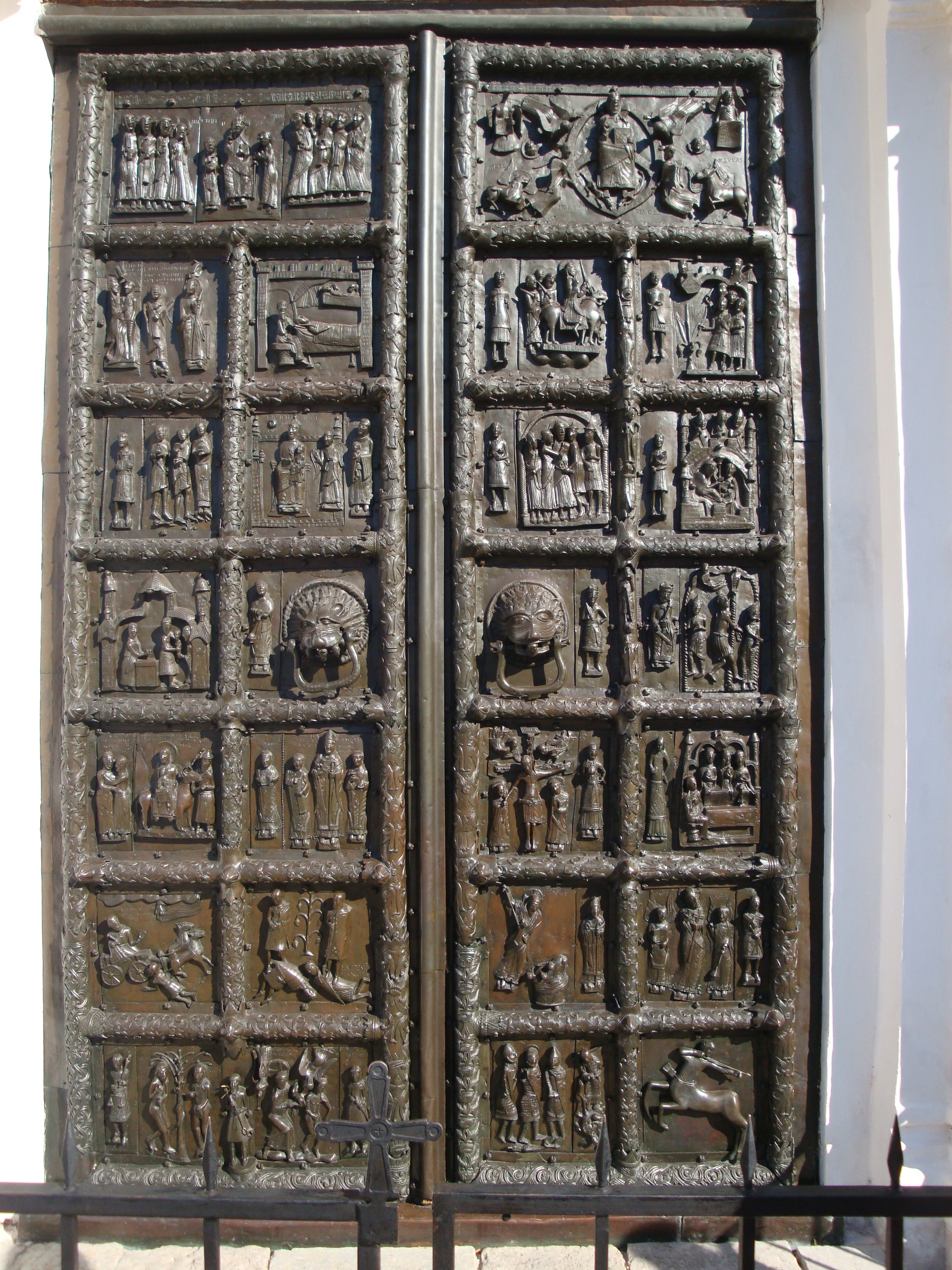 Софийский собор: Великий Новгород, Новгородская область